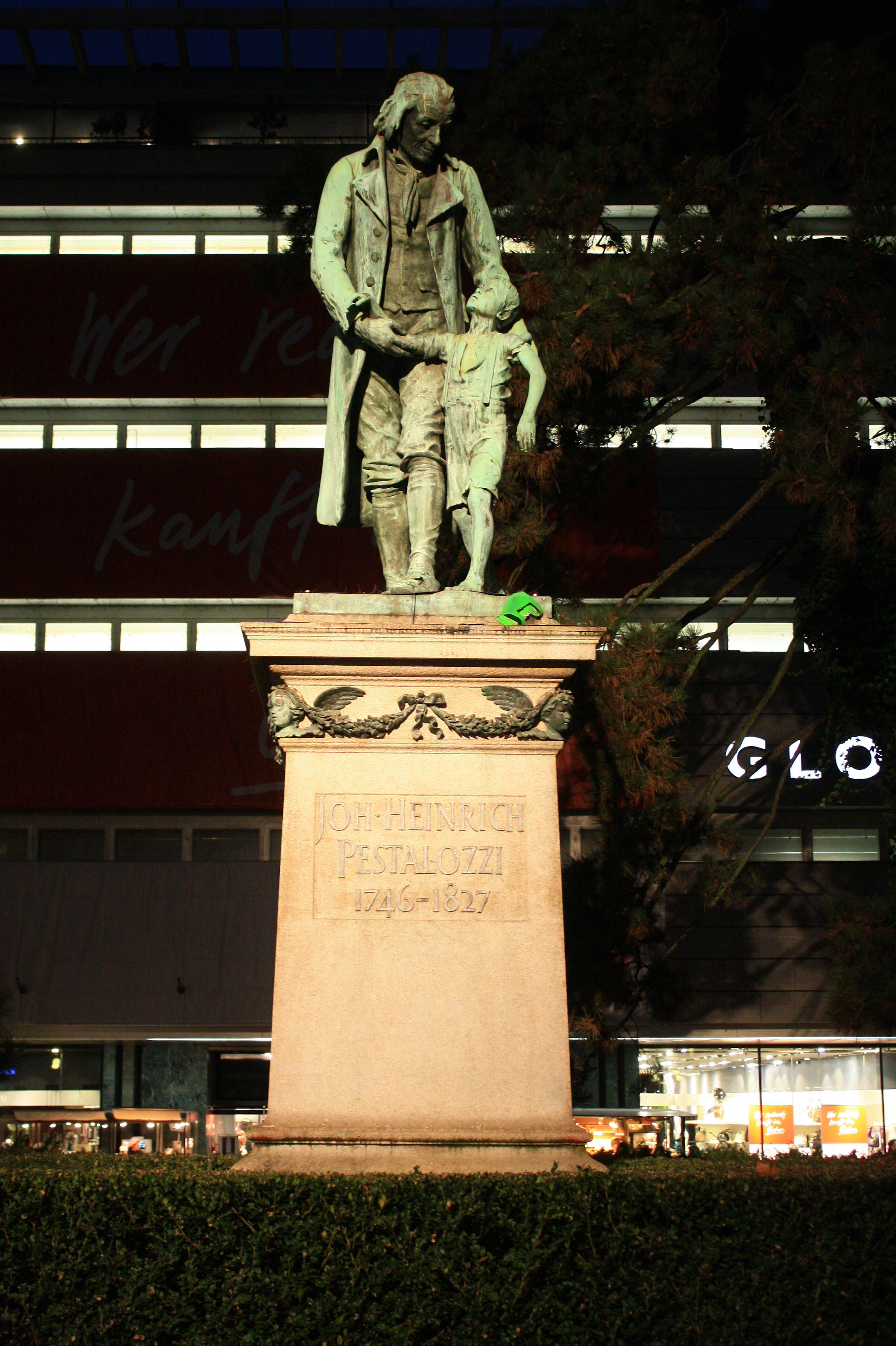 Johann Heinrich Pestalozzi (1746-1827) memorial at Pestalozziwiese (Bahnhofstrasse) in Zürich, Switzerland